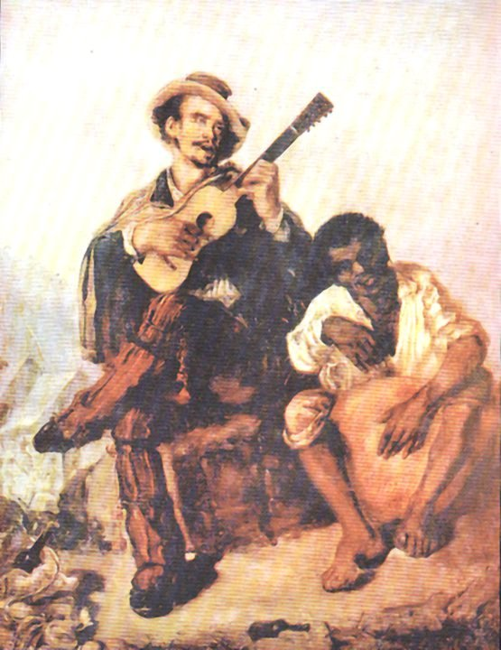 Pintura "Copla Criolla" del pintor peruano Ignacio Merino.